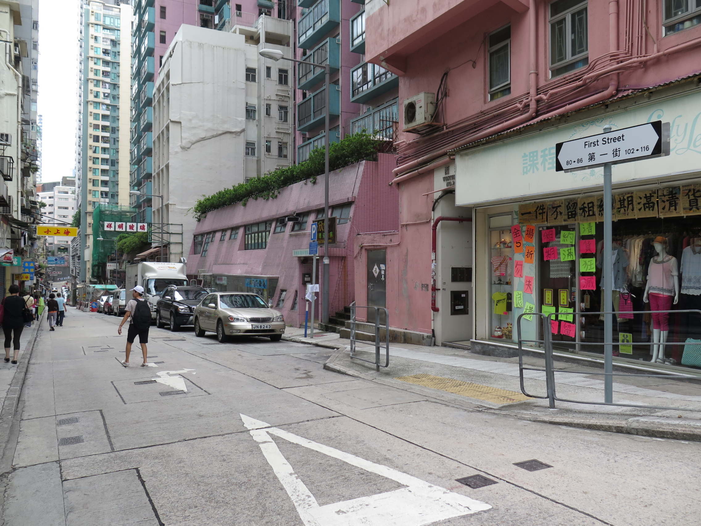 First Street, Sai Ying Pun